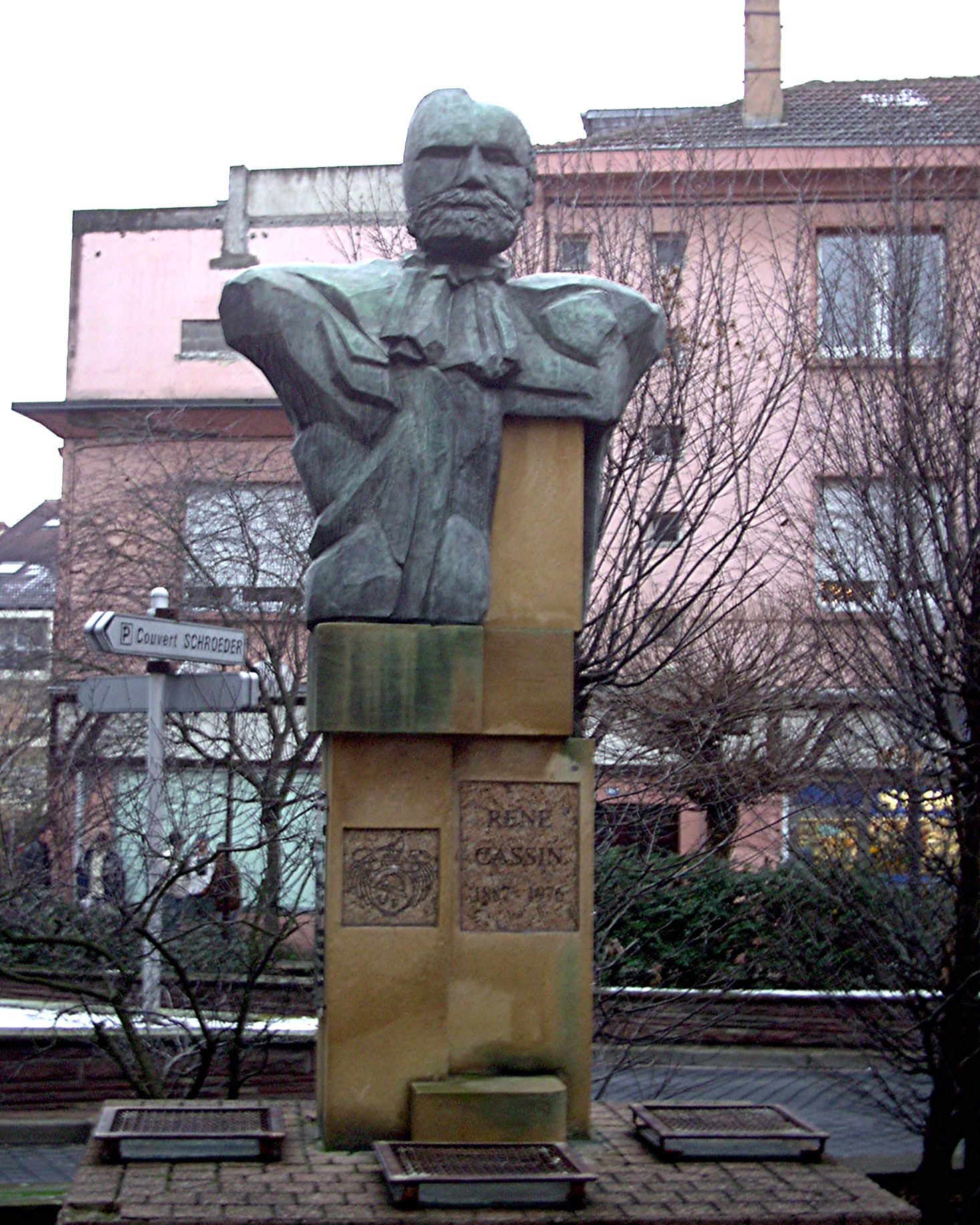 Denkmal (memorial) für René Cassin, Friedensnobelpreisträger 1968 (nobel peace prize) und Jurist in Forbach/Lothringen/Frankreich